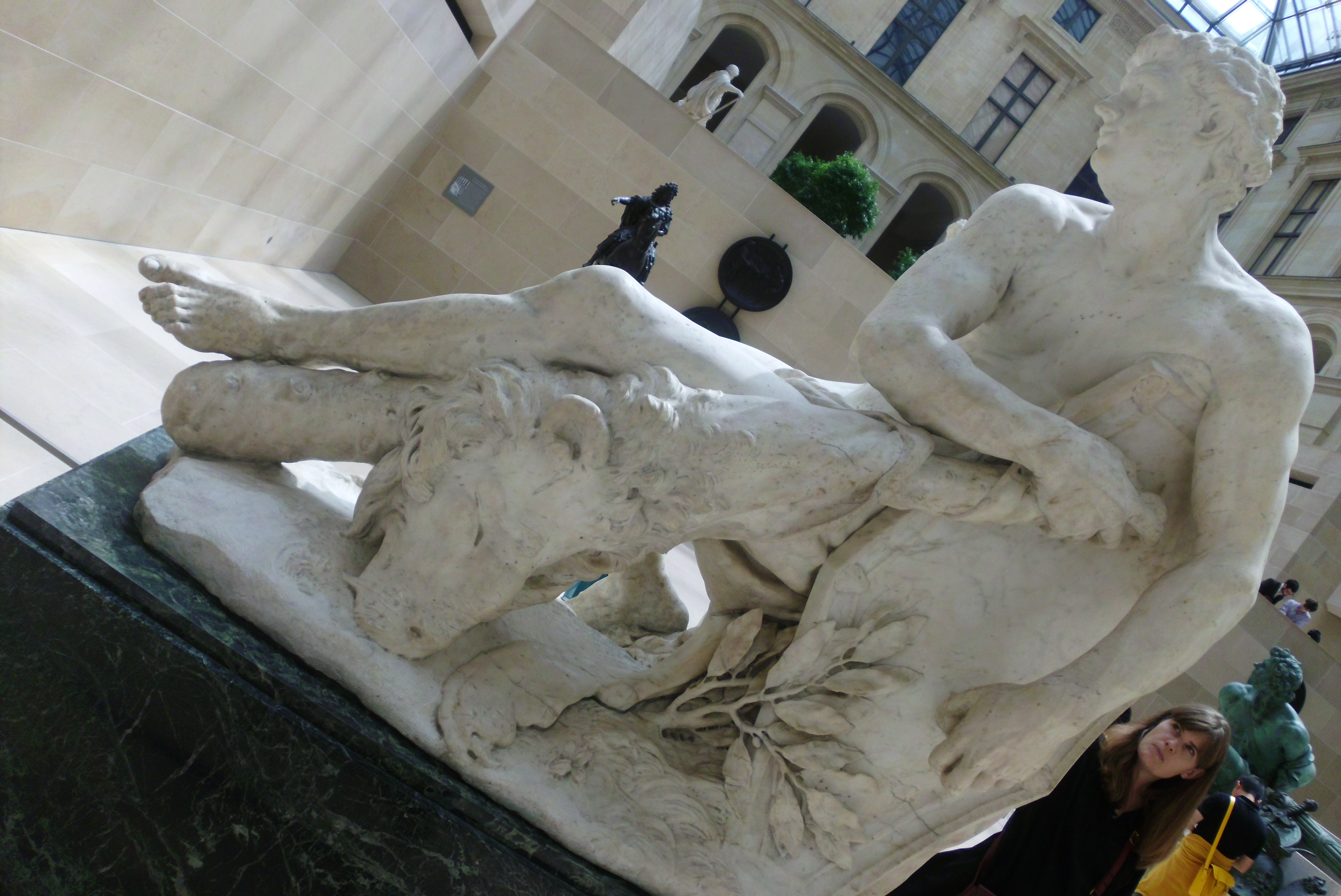 Paryż w 2013